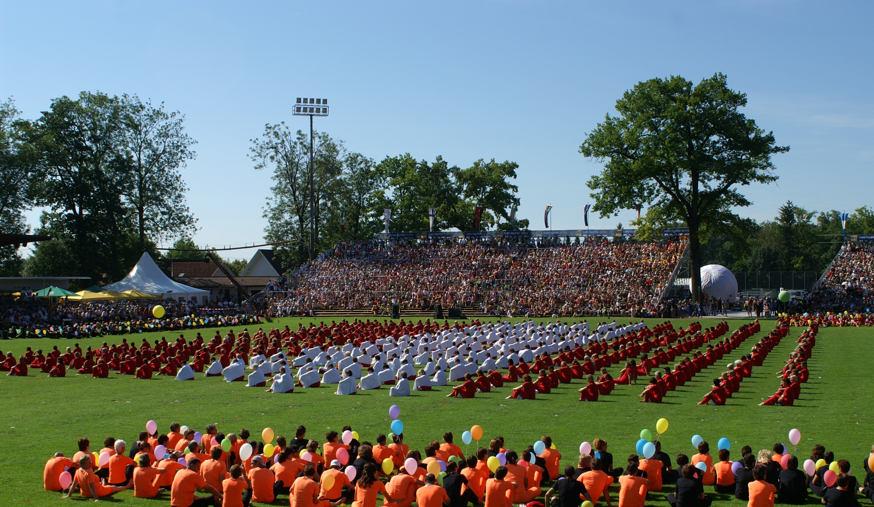 Dornbirn, Stadion Birkenwiese – Abschlussfeier der Weltgymnaetrada 2007. Nation Suisse, Switzerland, Schweiz